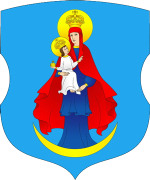 Herb Porozowa